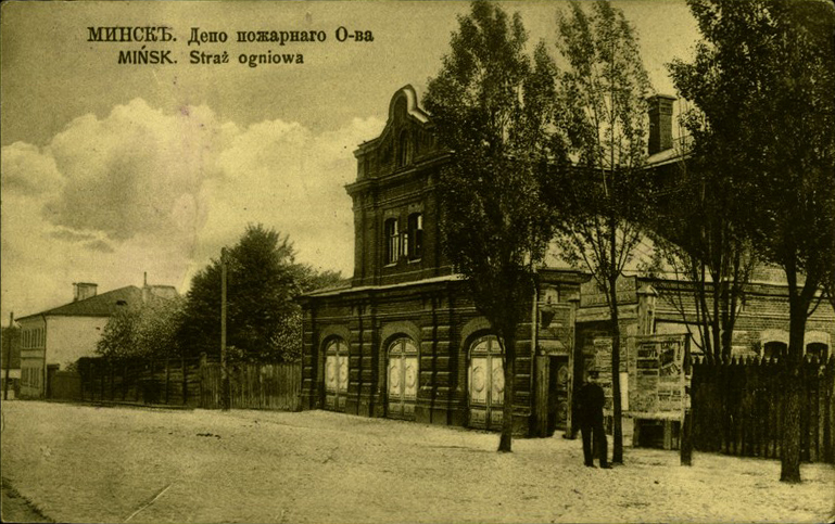 Беларуская (тарашкевіца): Менск (Miensk), Гарадзкі Вал (Haradzki Vał)